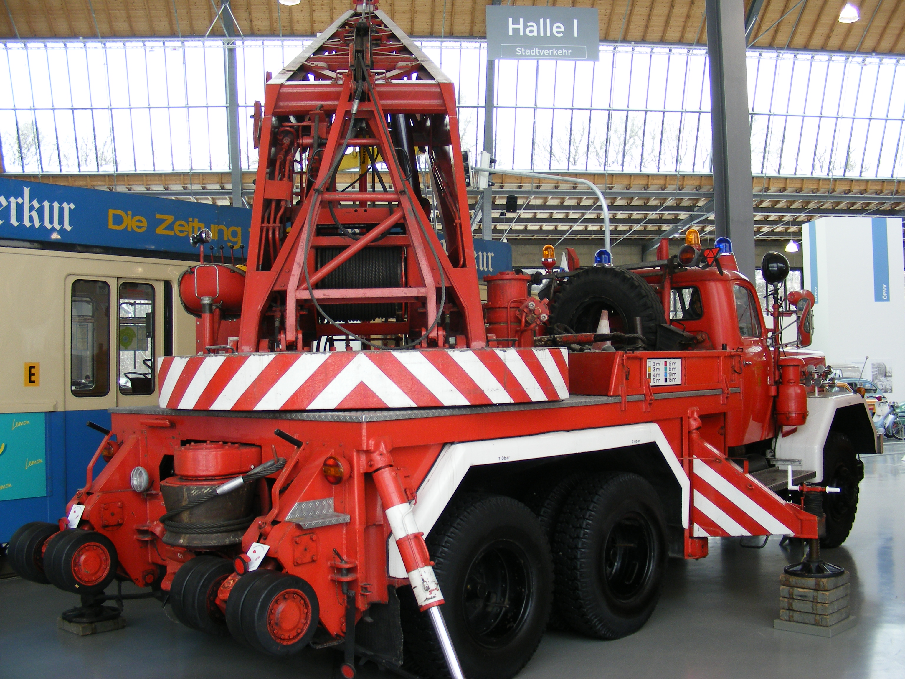 Feuerwehrkran Magirus F 250 D 25 A "F Uranus A", KW 16 (Klöckner Humboldt Deutz, Ulm), Baujahr 1965 , zuletzt bei der Berufsfeuerwehr München verwendet (Ansicht von hinten rechts) — Exponat im Deutschen Museum Verkehrszentrum München.